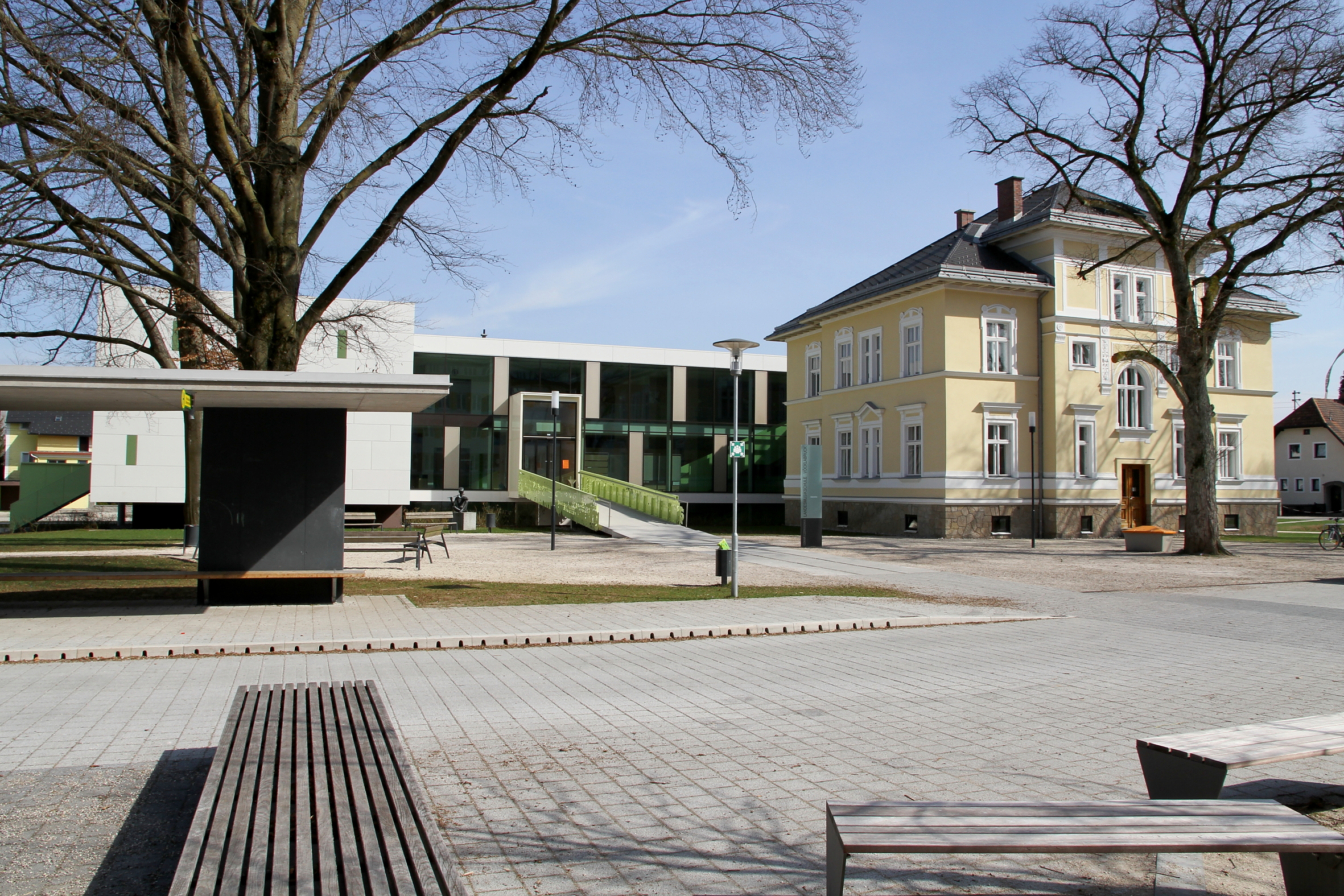 Die denkmalgeschützte Villa Czerwenka in der oberösterreichischen Stadt Vöcklabruck. Die Villa samt Park wurde von der Stadtgemeinde angekauft, renoviert, mit einem modernen Zubau erweitert und um 5 Mio. Euro 2008 zur Landesmusikschule umgebaut.